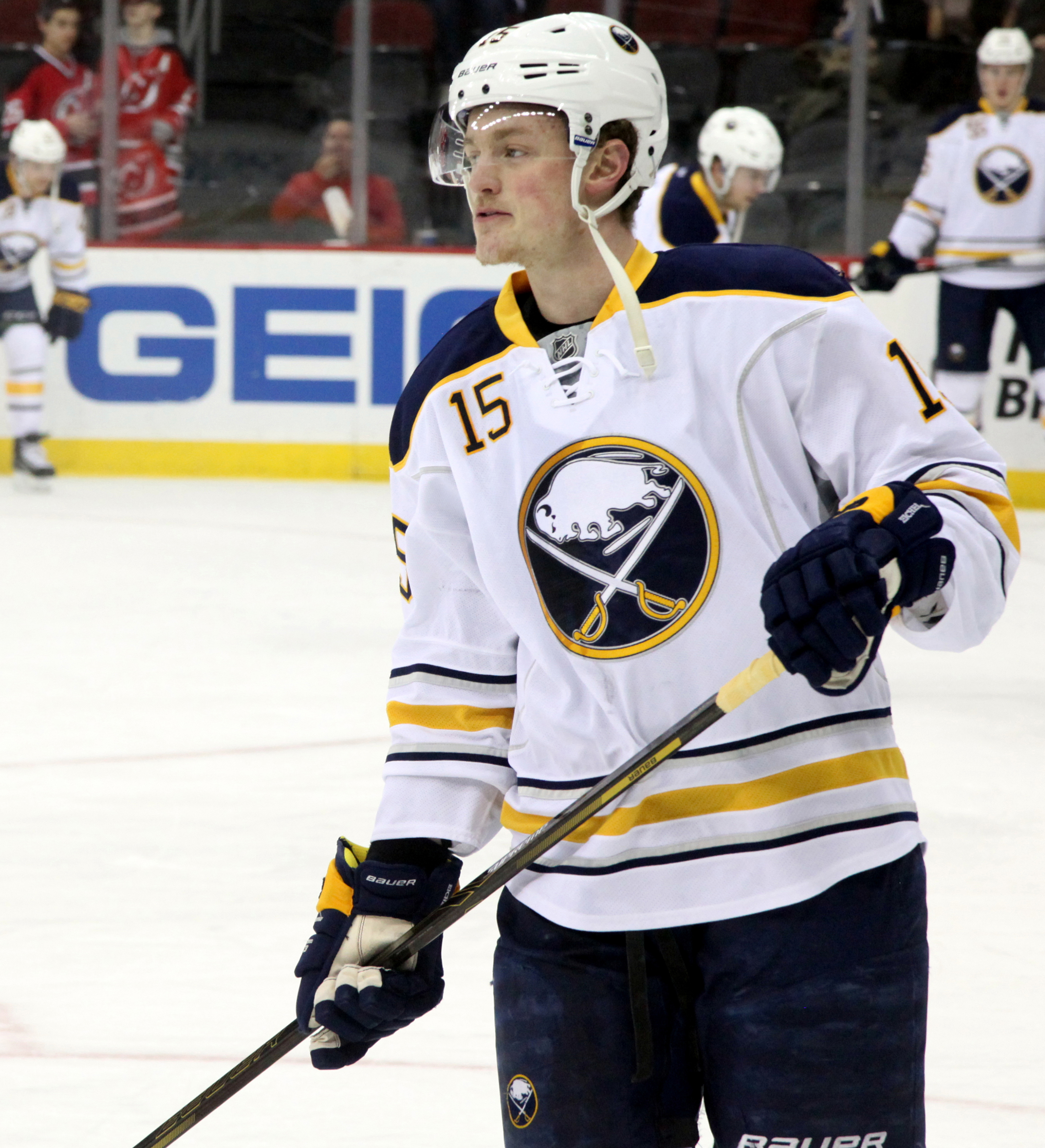 Jack Eichel in April 2016.